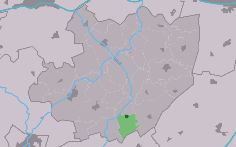 Kaartsje fan himrik fan Lytsewierrum